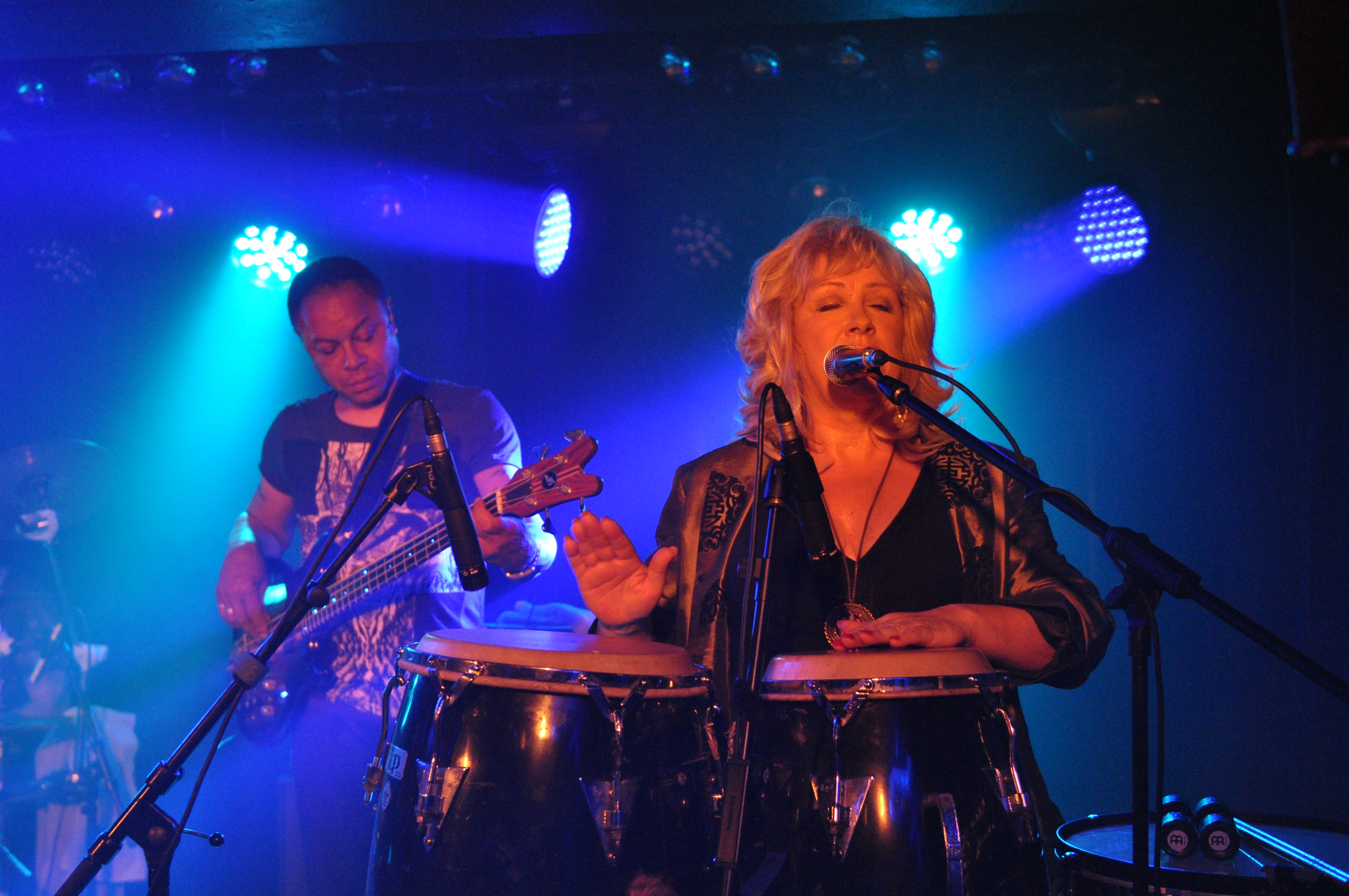 Shakatak am 19. September 2014 im Live Club Barmen in Wuppertal